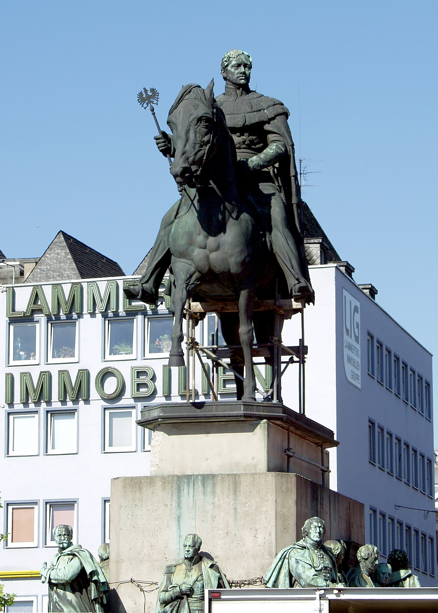 Friedrich Wilhelm III.-Reiterstandbild auf dem Kölner Heumarkt. Frontansicht von Osten.